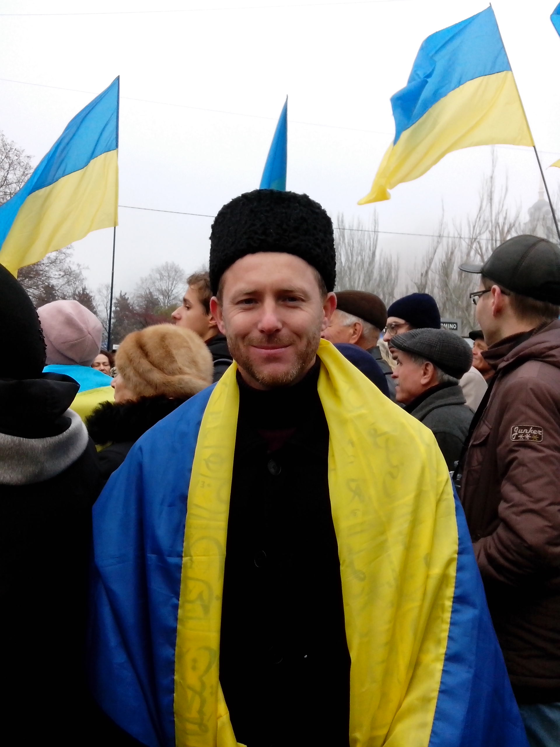 Муфтій ДУМУ "Умма" Саід Ісмагілов як громадянин України на донецькому проукраїнському мітингу біля пам’ятника Т.Г.Шевченко.